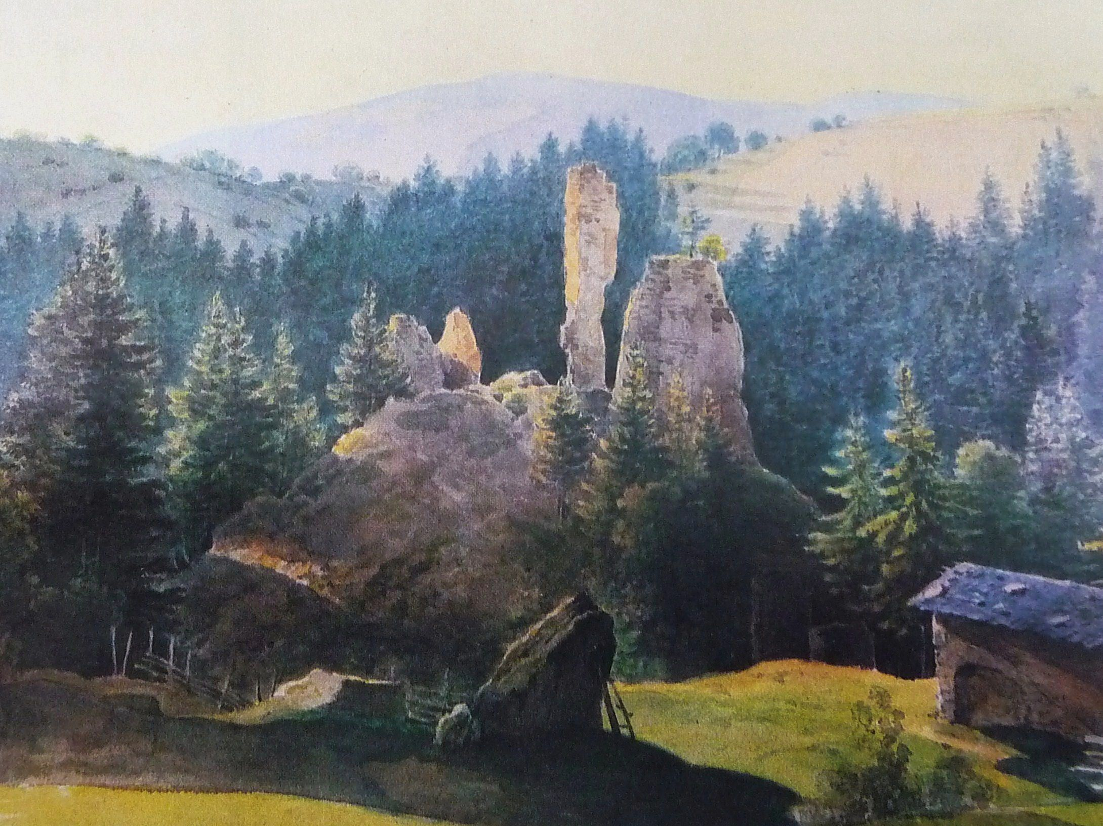 Skizze